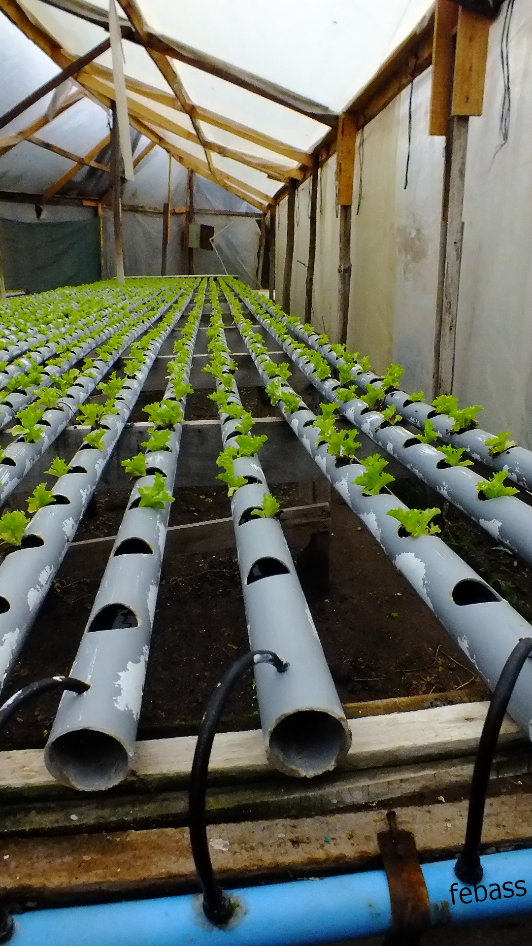 lechugas hidroponicas en estado de crecimiento en un invernadero en Calera de Tango - Santiago - Chile